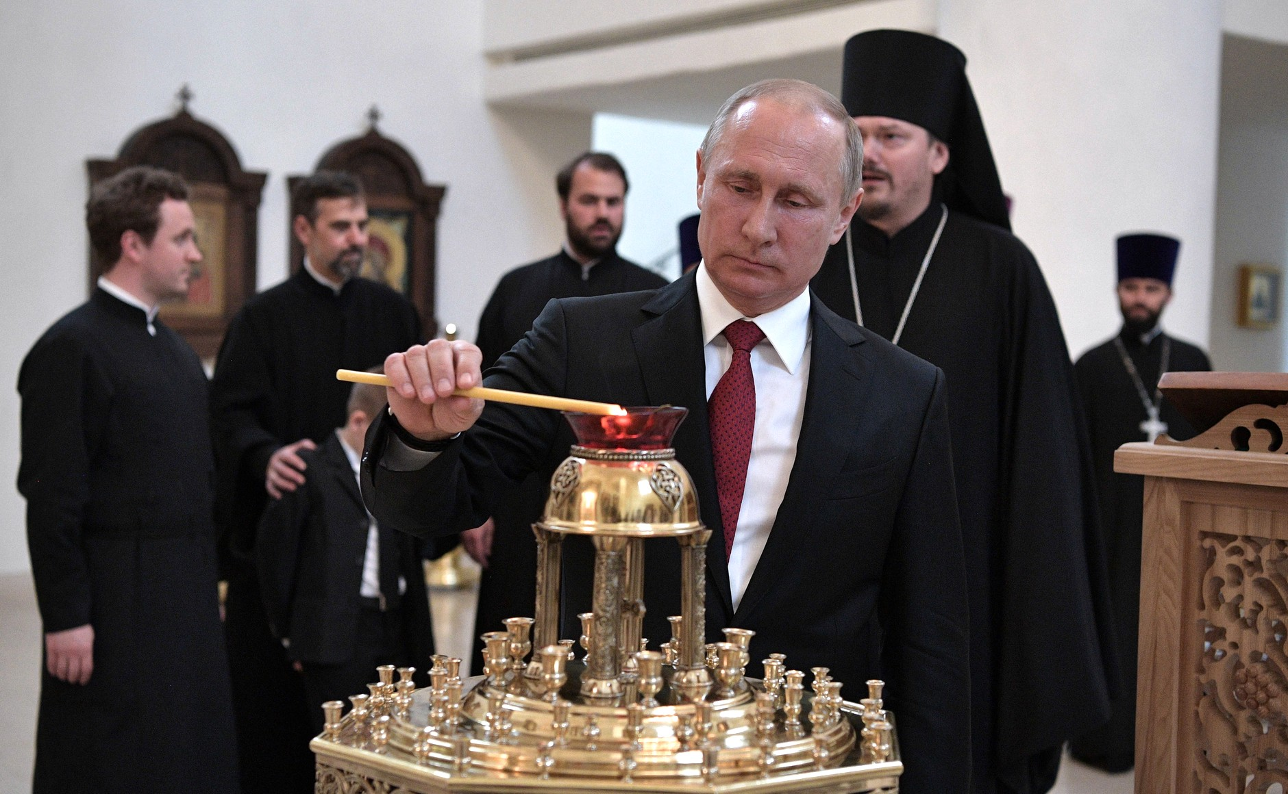 Президент России Владимир Путин во время посещения Российского духовно-культурного центра в Париже.